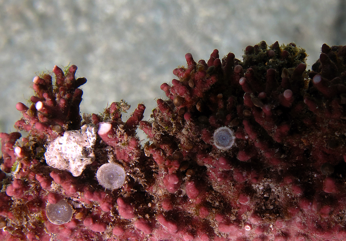 Une algue corallinale Lithothamnion sp. à la Réunion.